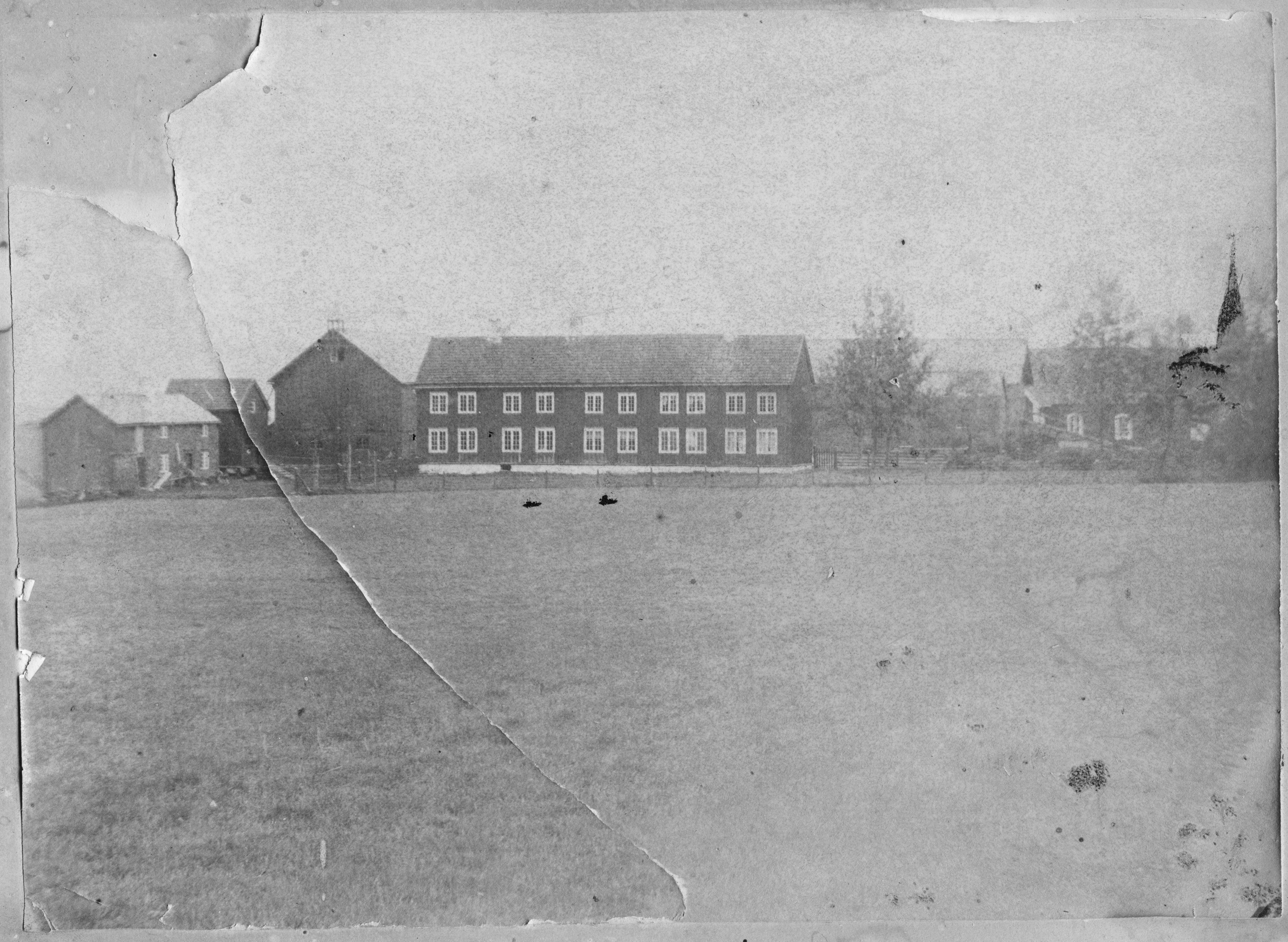 Bak til høyre er Skatval kirke (oppført 1767, ombygd til korskirke 1854, revet 1900). Gården i forgrunnen er Skatval østre (Kjerk-Skatval, Skatvold østre) med hovedbygning oppført 1829. Bildet er tatt sist på 1800-tallet. Se bl.a. Stjørdalsboka bind 4, s. 196. Fotograf / Photographer: H. Danielsen, Levanger Fotoeier / Photo owner: Øyvind Fiskvik Digitalisering / Digitizing: Arne Langås (2015) Foto-ID / Photo ID: 095-0247 Hvis bildet gjengis i andre sammenhenger, oppgi Åsen Museum og Historielag, fotoeier og fotograf som kildereferanse. Har du utfyllende opplysninger? Legg gjerne igjen en kommentar nedenfor eller send e-post til . | If you re-use this photo, please refer to Åsen Museum og Historielag, the photographer and the owner of the photo. Do you have additional information? Please leave a comment or send an e-mail to .